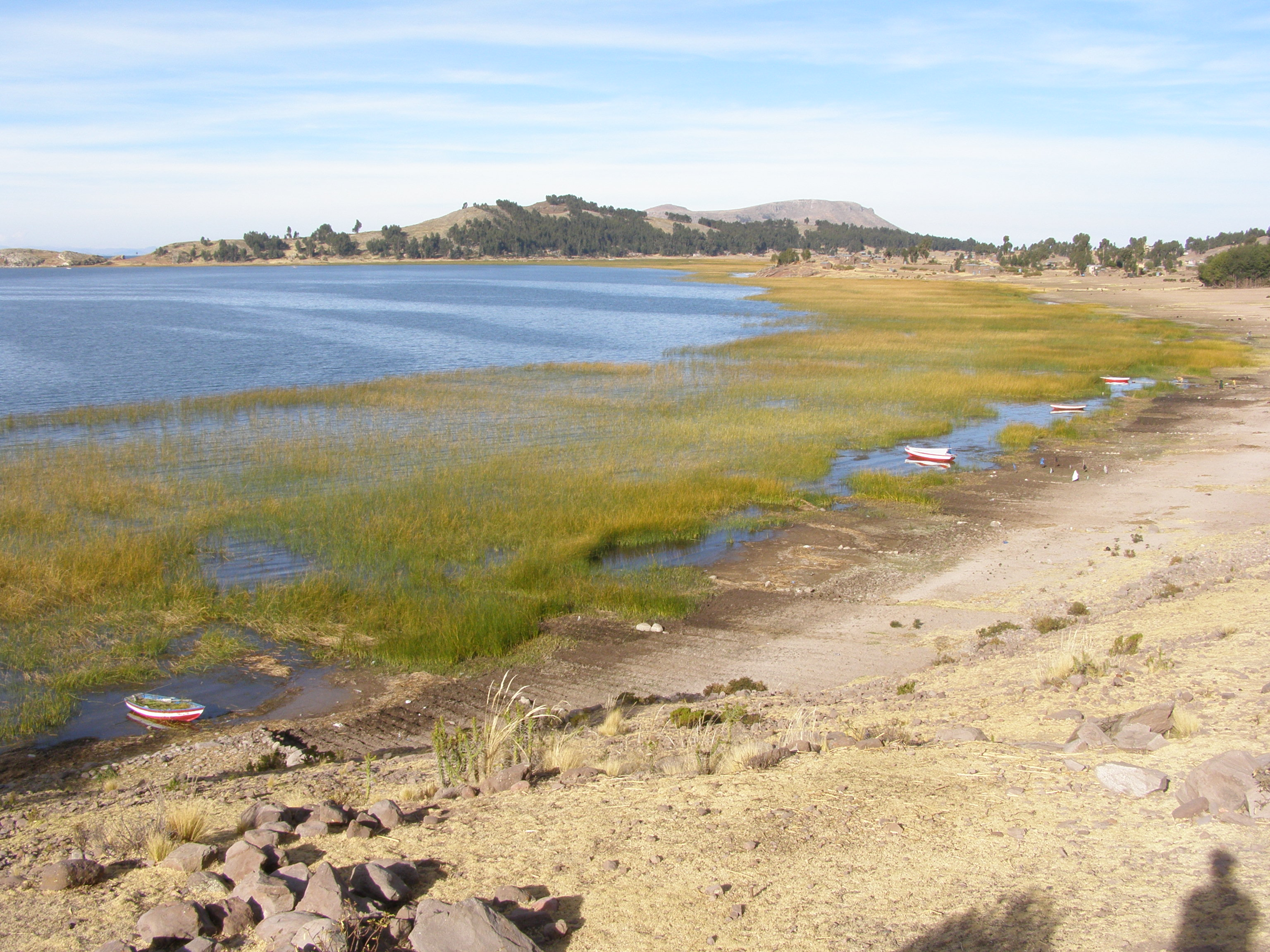 eigen werk